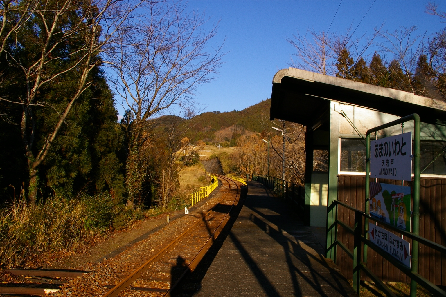 Amanoiwato Station in Miyazaki, Japan